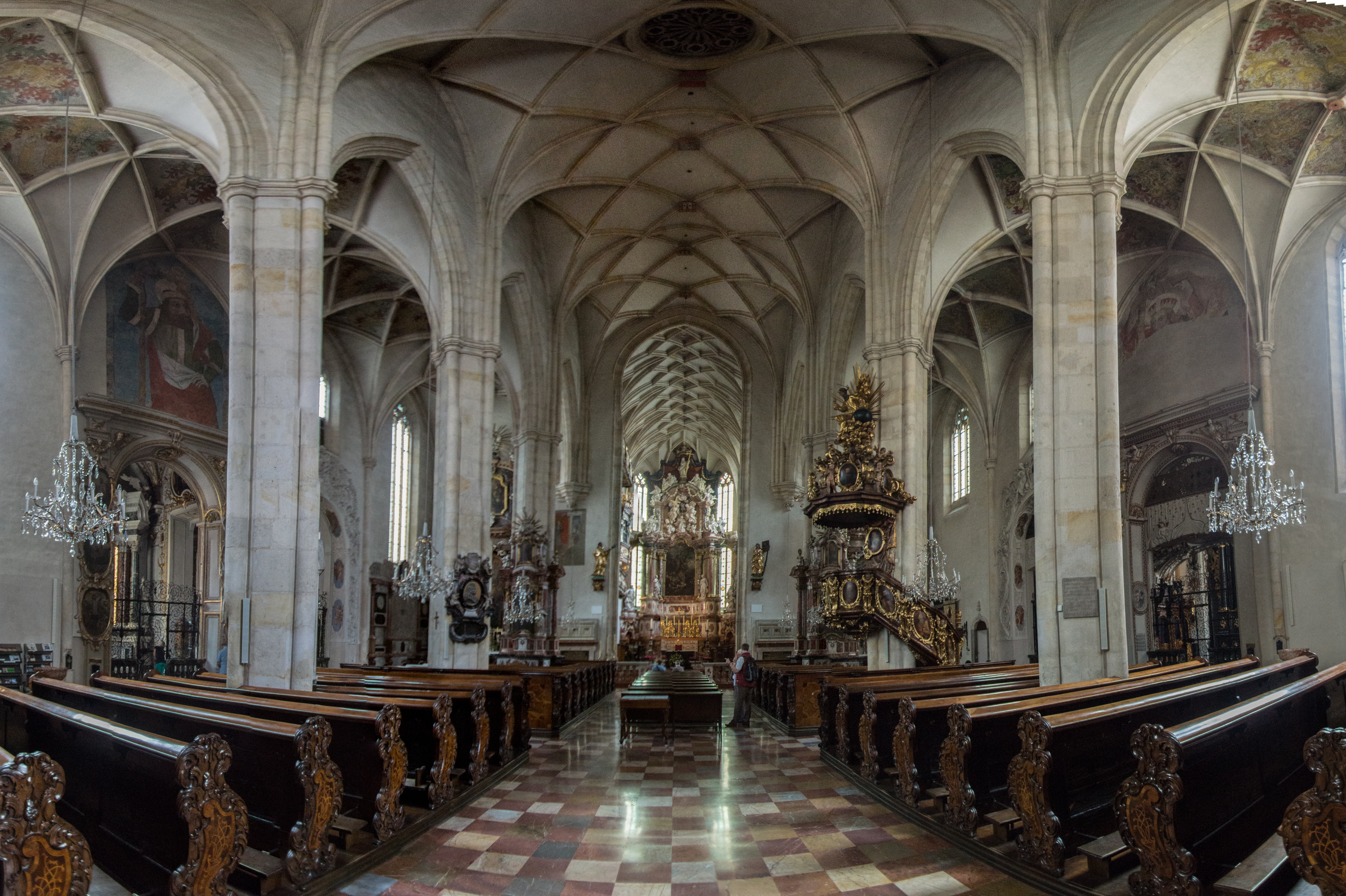 Catedral de Graz